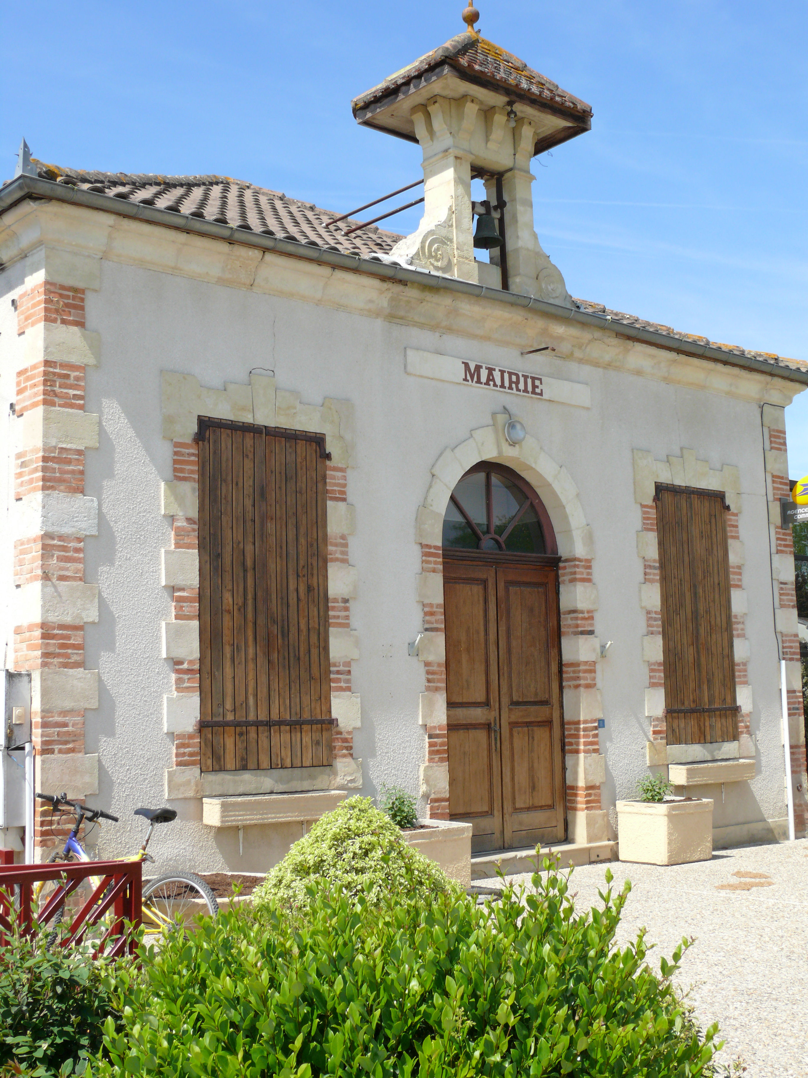 Momuy - Mairie